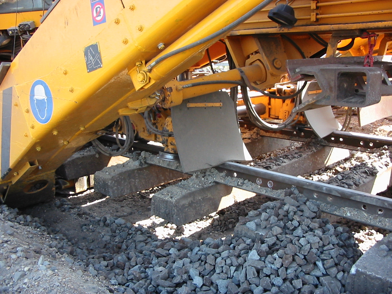 Zúzottkő ágyazat rostálása Plasser&Theurer RM 80 UHR rostálógéppel (Budapest-Ferencváros rendezőpályaudvar, Keleti gurító)